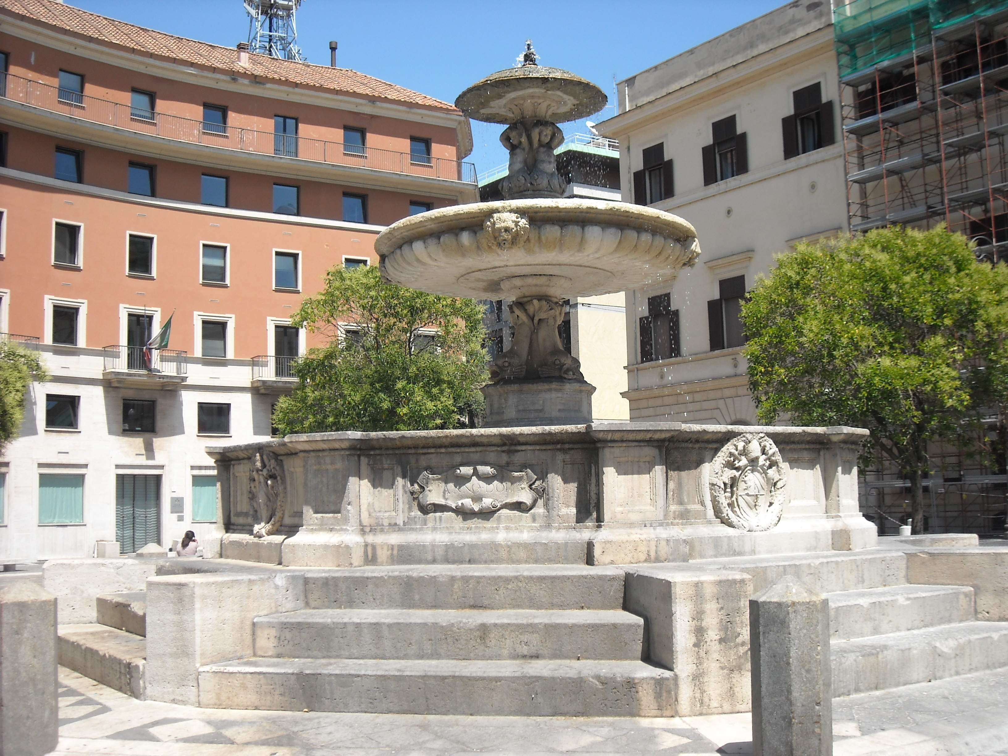 La fontana al centro di piazza Mastai, a Roma